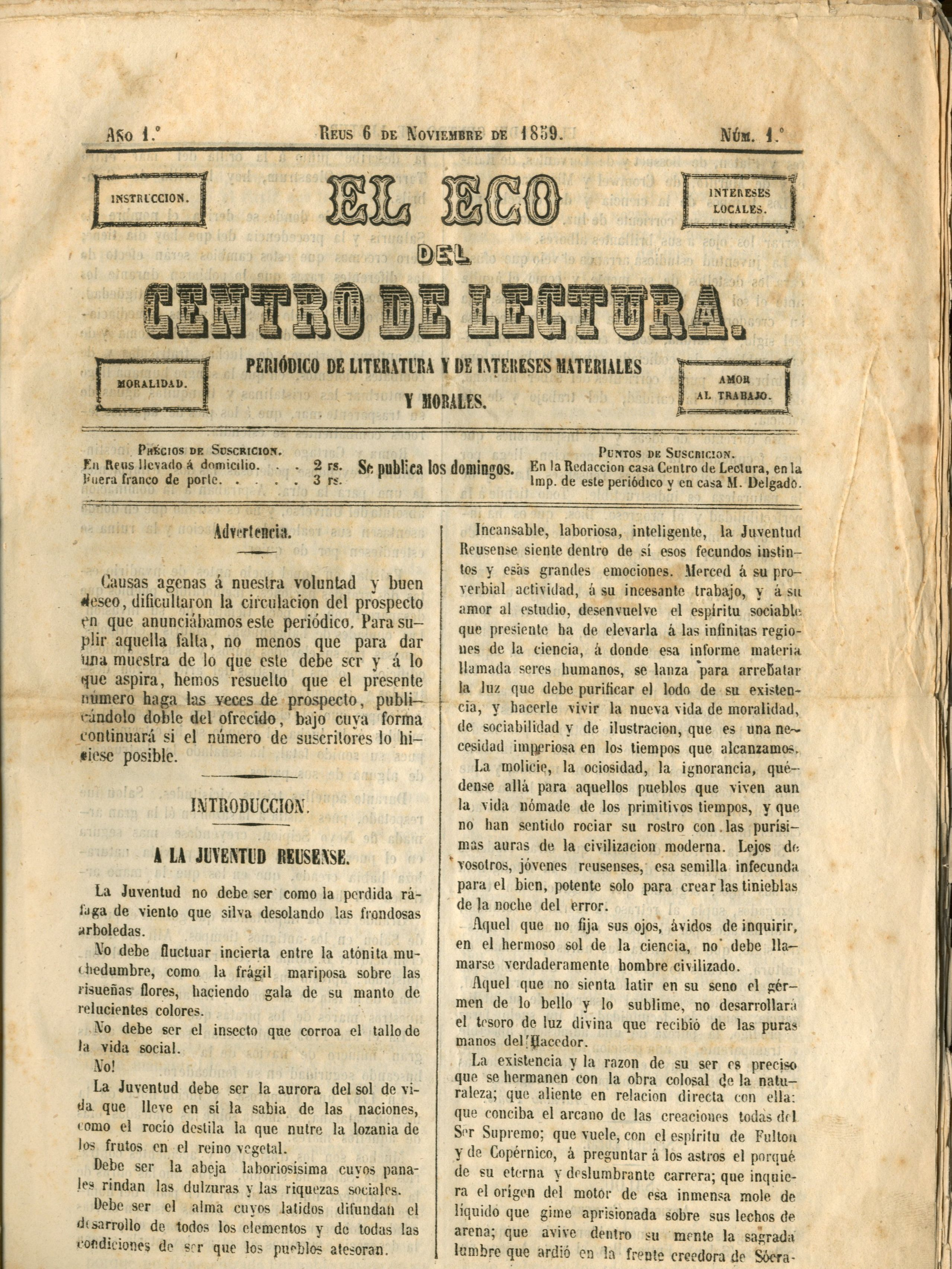 Primera pàgina del número 1 del Eco del centro de Lectura